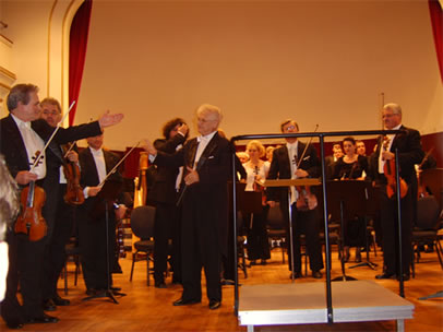 Ervin Acél în Oradea, la unul din ultimele concerte